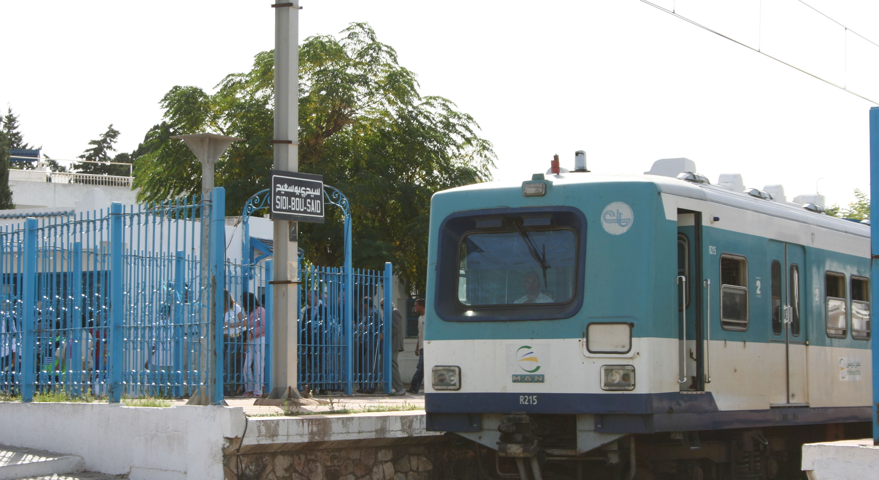 TGM en Tunisie